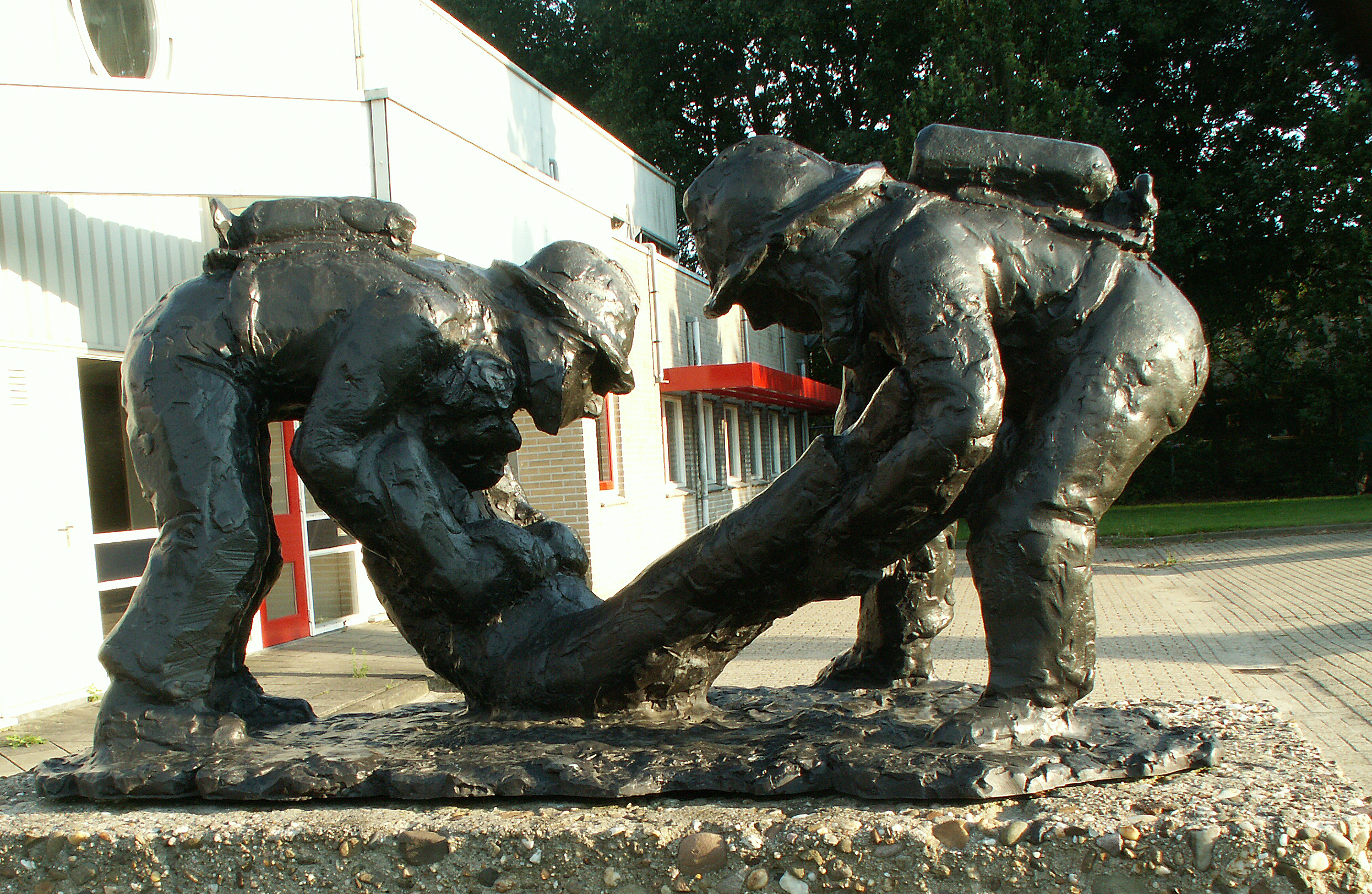 Sculpture "De reddende brandweerman" (Rautekgreep) by Peter de Leeuwe, 1991, brandweerkazerne, Burg. vd Postlaan Leusden